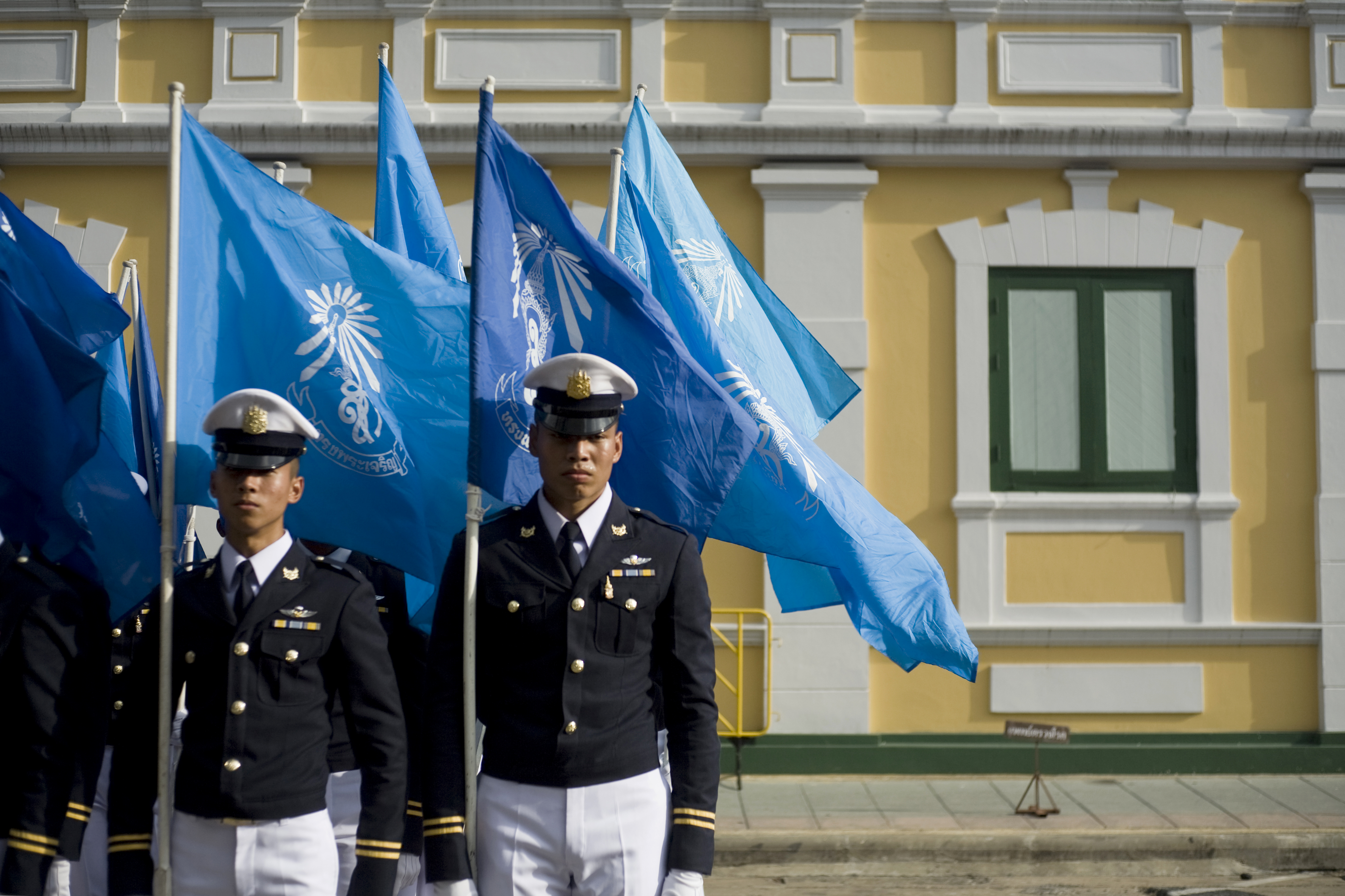 บรรยากาศ ณ มณฑลพิธีท้องสนามหลวง ถนนราชดำเนิน 12สิงหาคม2552 (The Official Site of The Prime Minister of Thailand Photo by พีรพัฒน์ วิมลรังครัตน์)